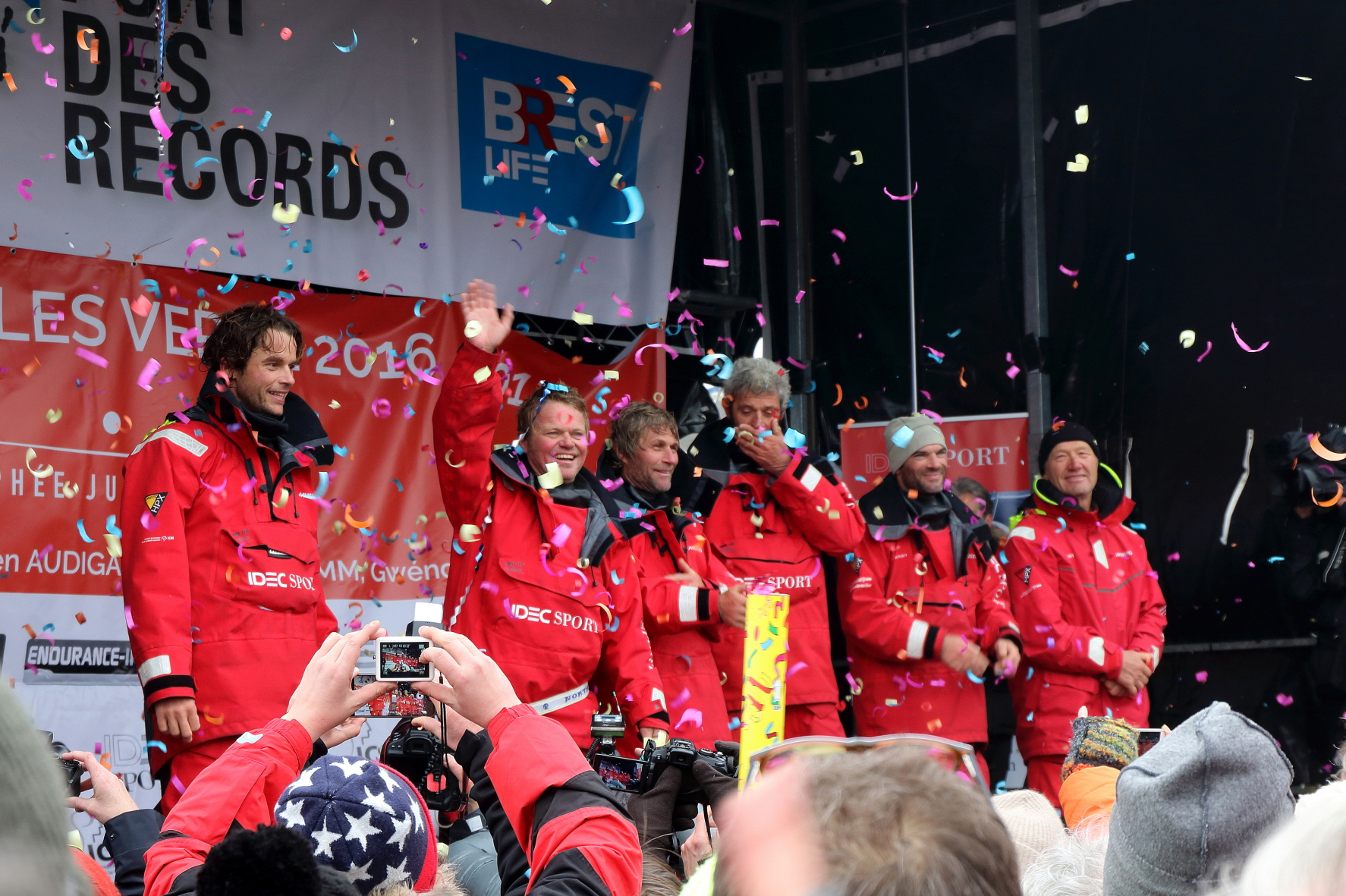 Arrivée de Francis Joyon et de l'équipage du maxi trimaran Idec Sport à Brest après leur record en 40 jours autour du monde, le 26 janvier 2017.